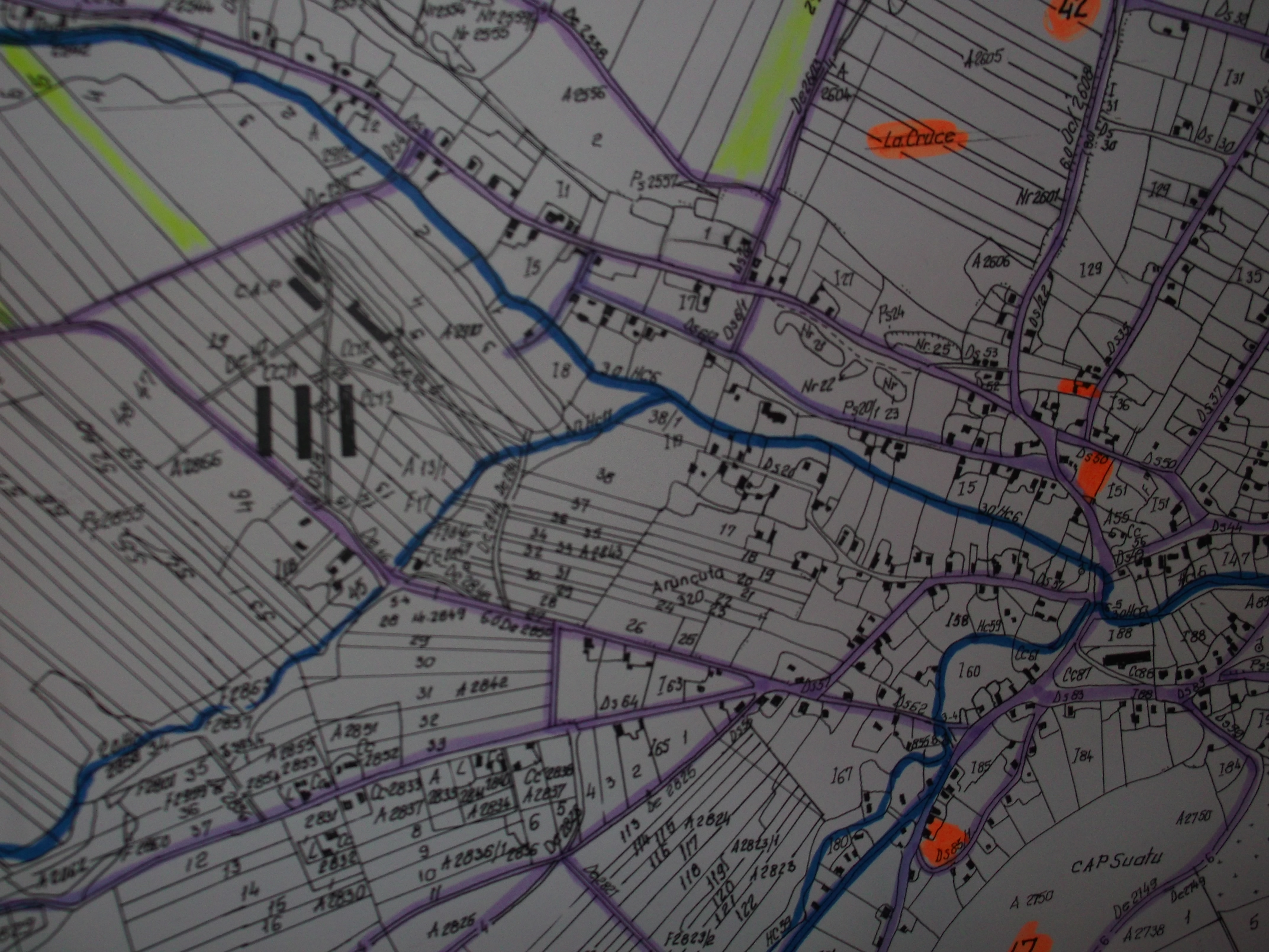 Schita de amplasament a CAP - ului din Aruncuta, Jud.Cluj